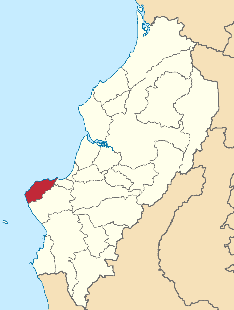 Mapa localizador del cantón en Manabí, Ecuador